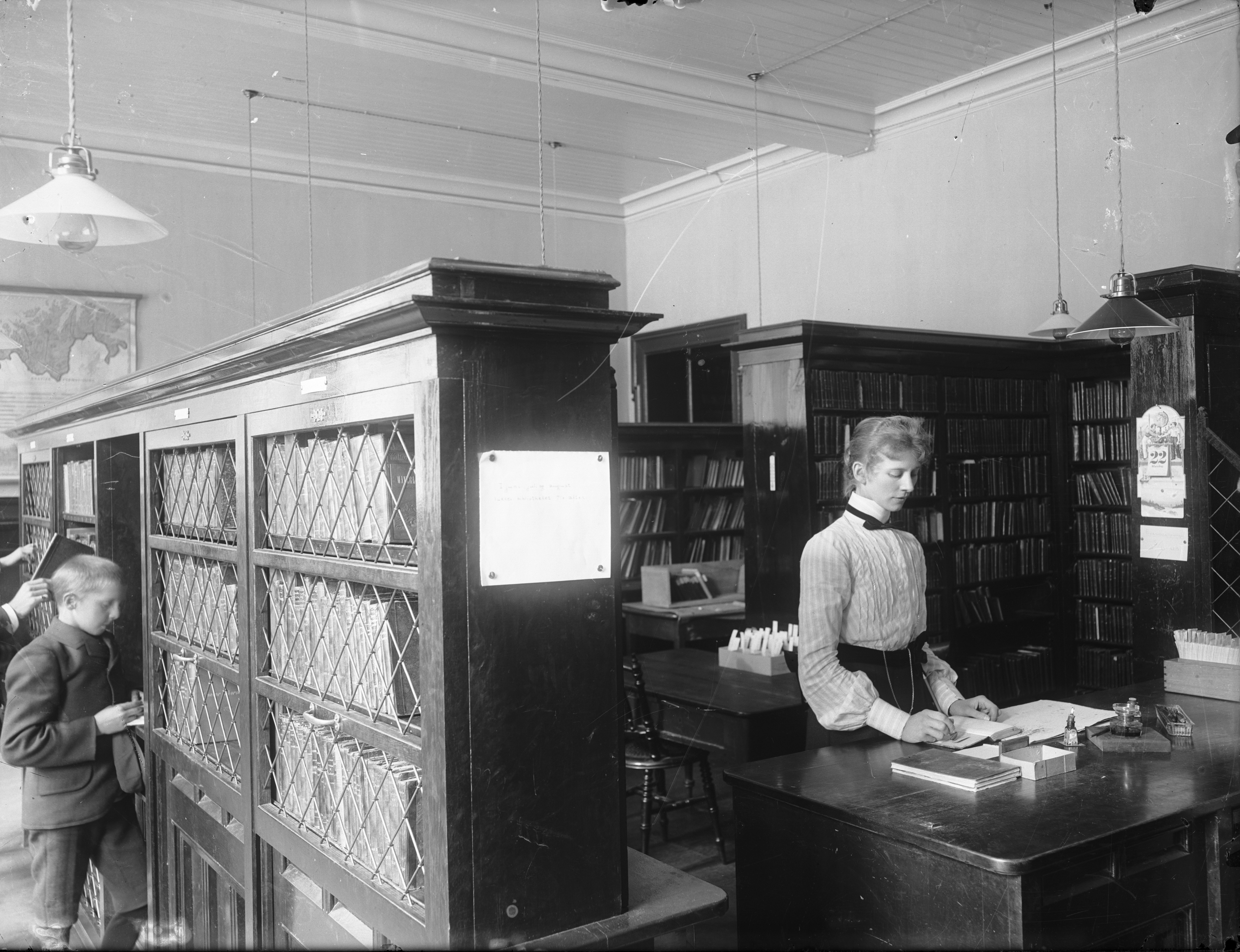 Fra Trondheim folkebiblioteks første lokaler i Kjøpmannsgata 12. Bildet er fra Afdeling for Ungdom, som åpnet i 1902. Reolene i denne avdelingen var stengt med gitter og måtte låses opp av bibliotekaren